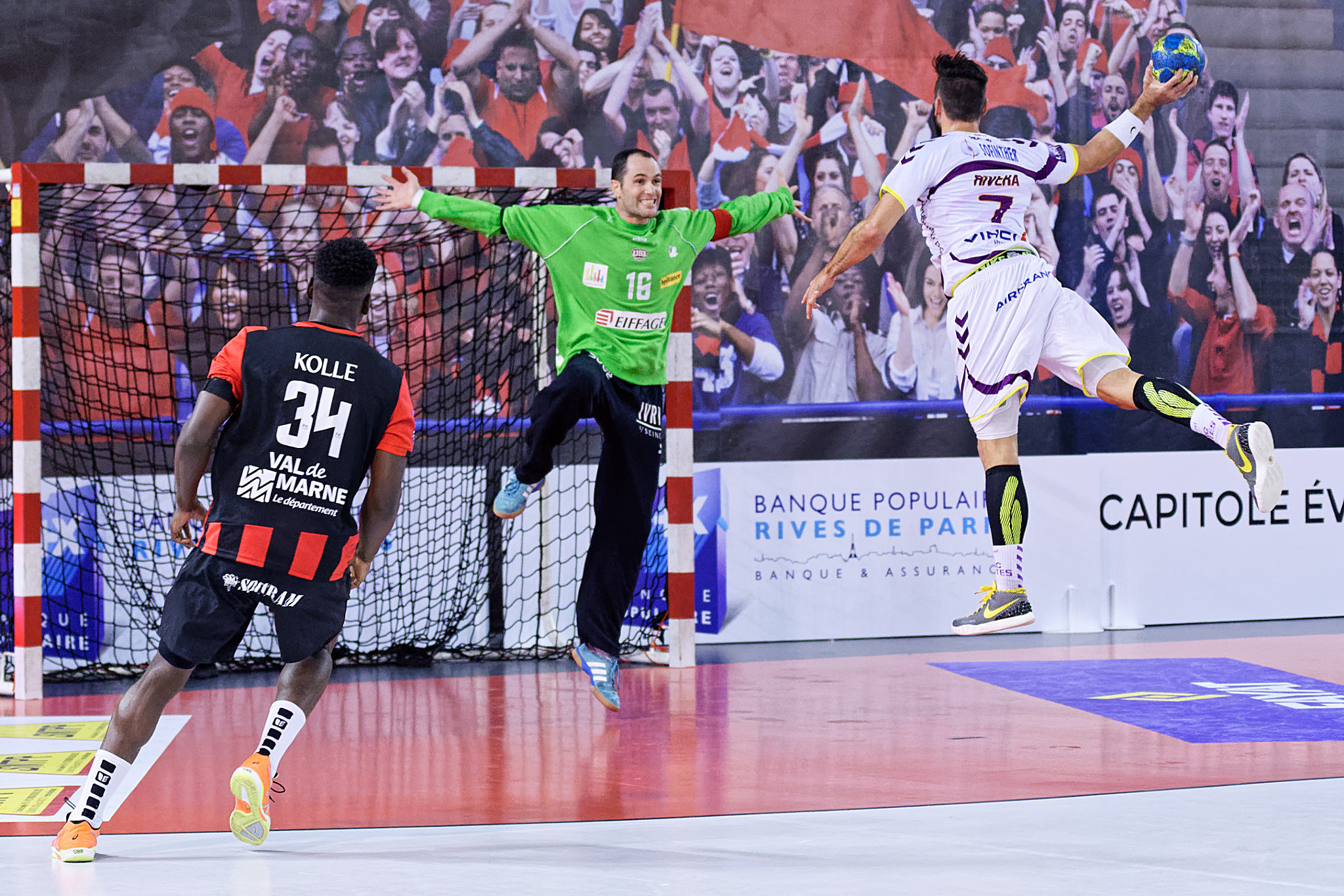 Rencontre de LNH entre l'US Ivry et le HBC Nantes. A Ivry, le 18 novembre 2015.